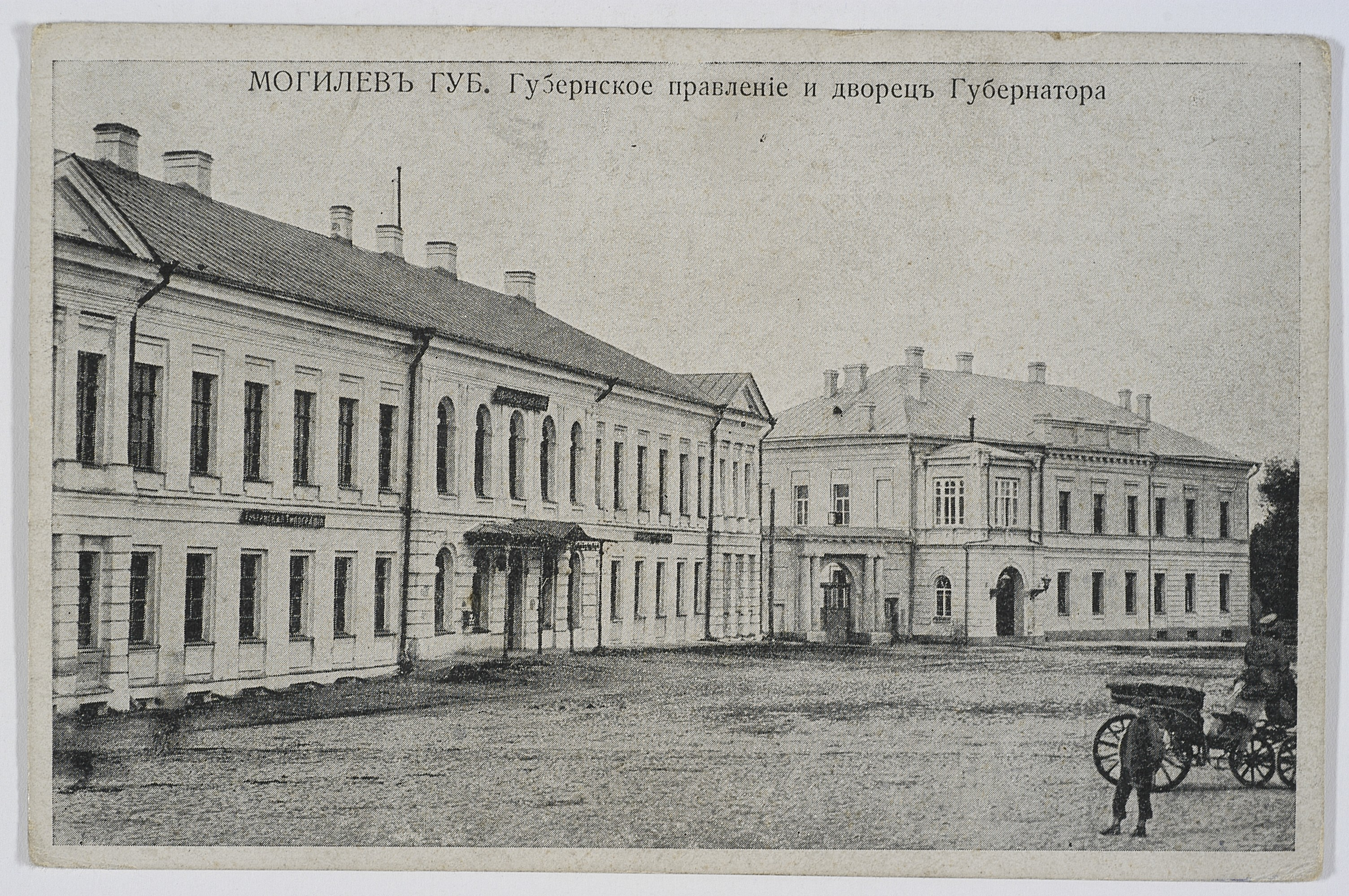 Беларуская (тарашкевіца): Магілёў (Mahiloŭ), пляц Рынак (plac Rynak). Управа і палац